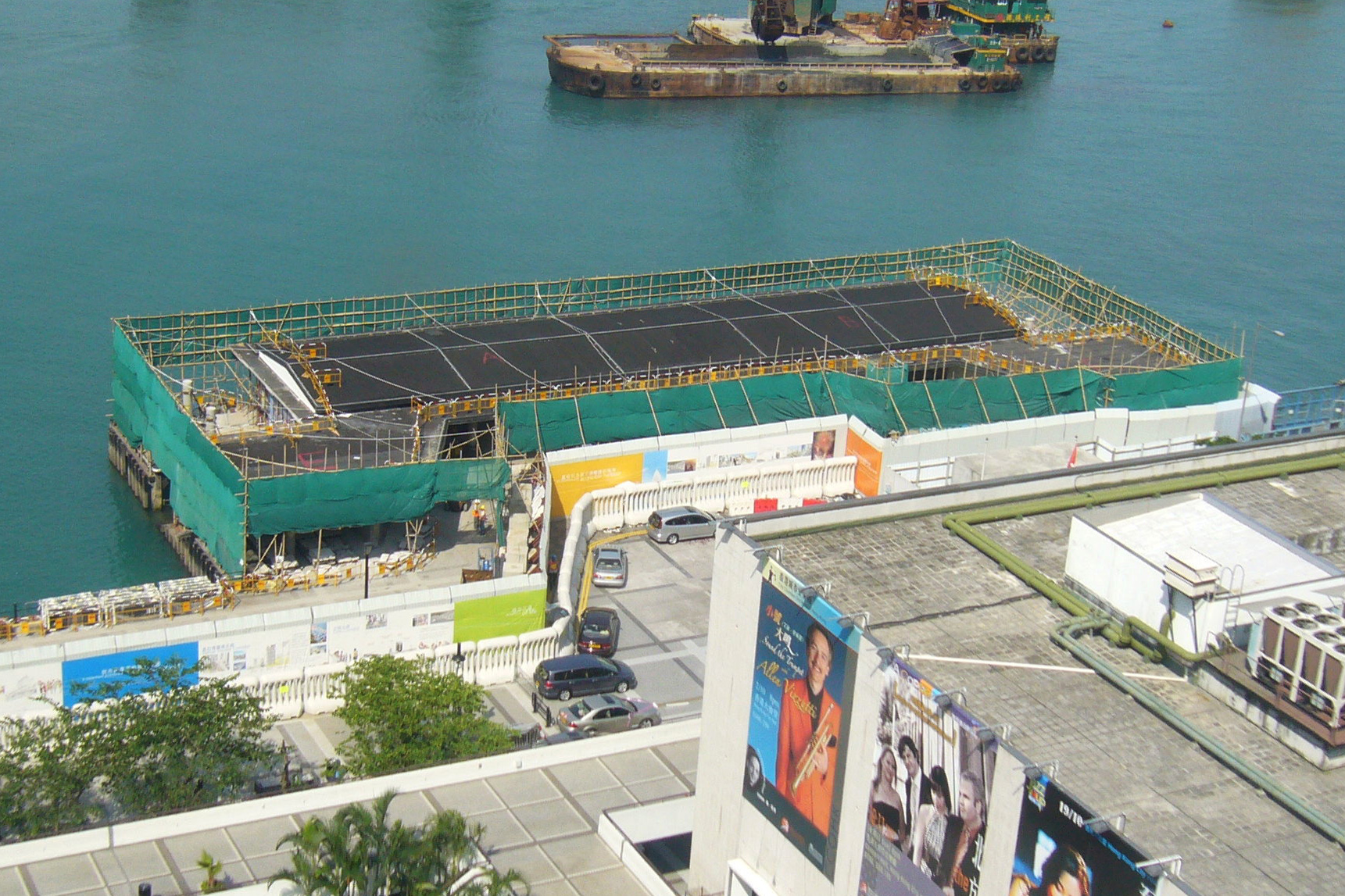 中文（香港）: 拆卸中的皇后碼頭